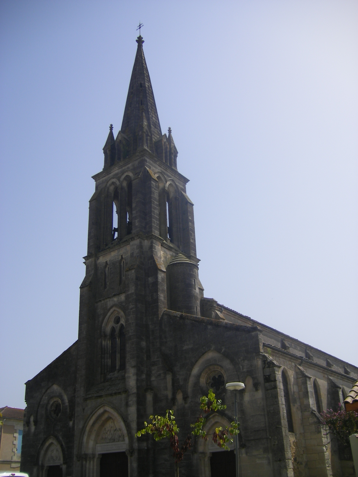 Grignols, Église Notre-Dame de l'Immaculée Conception